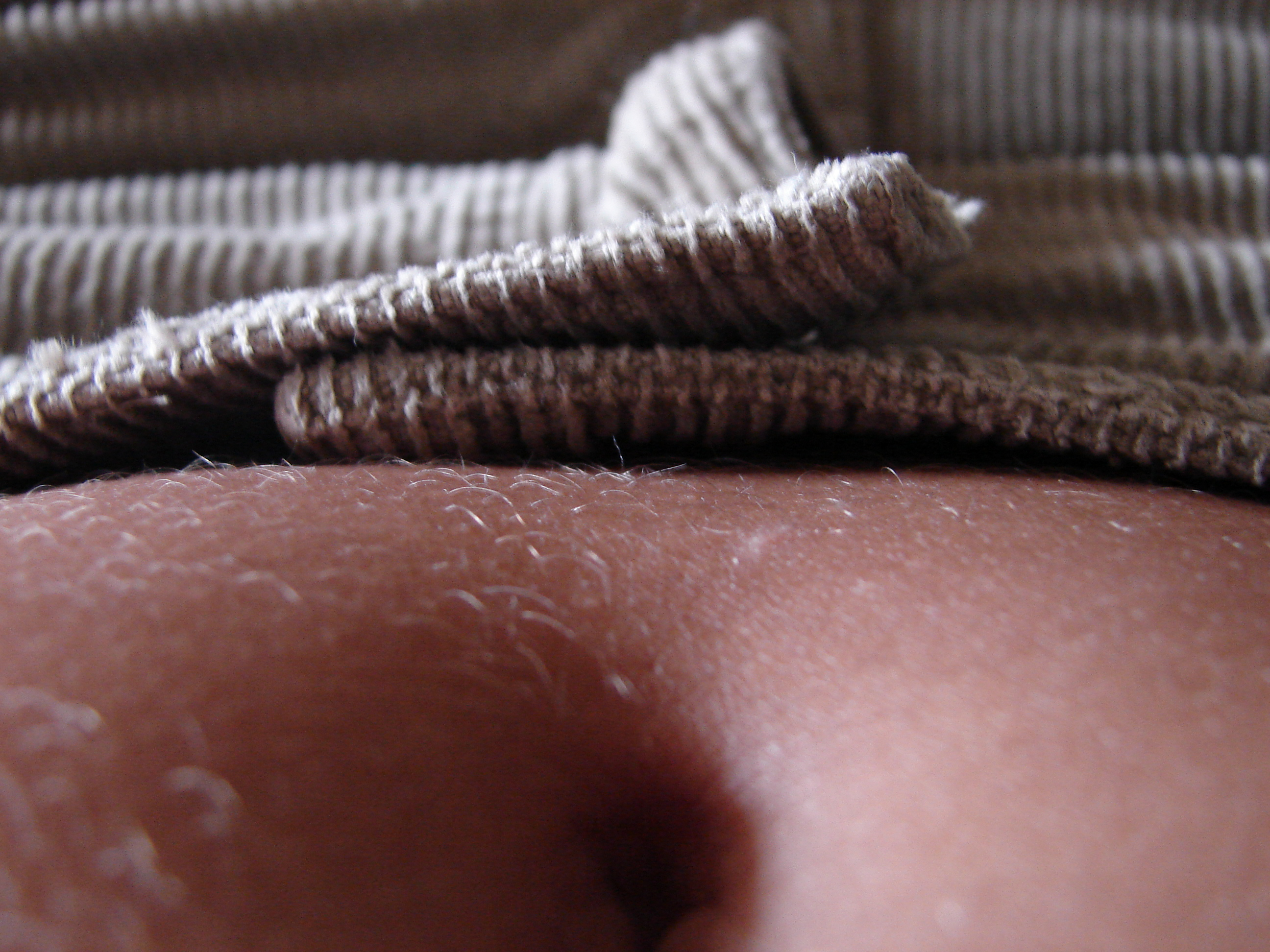 Pancinha e veludo cotelê.